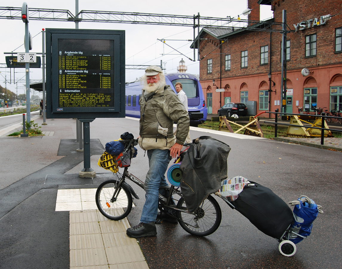 Börge V Hornemann, berest Vagabond, besökte Ystad under en vecka i sep 2011.